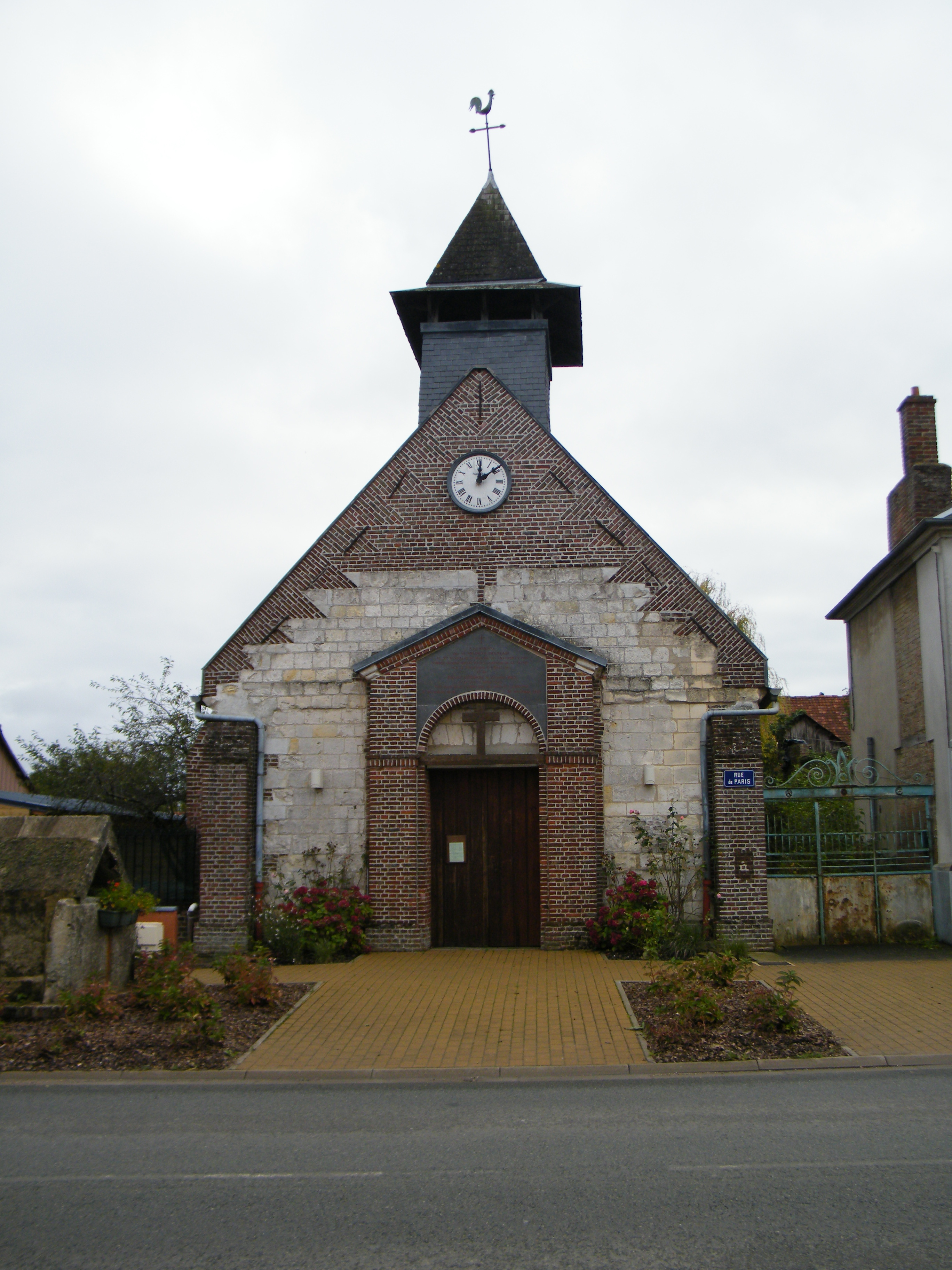 L'église Saint-Côme et Saint-Damiens d'Hébécourt.